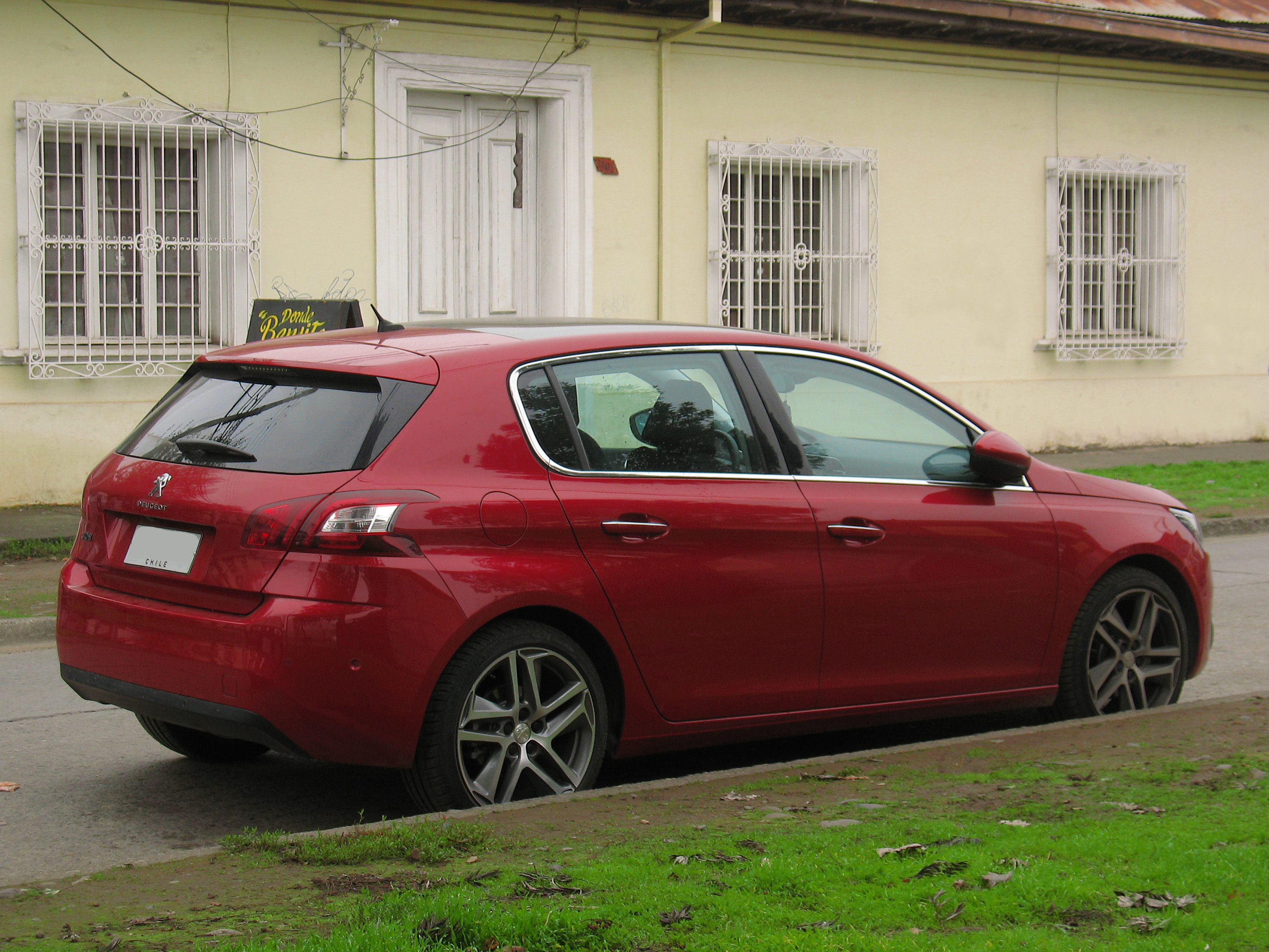 Peugeot 308 1.6 e-HDi Premier 2014